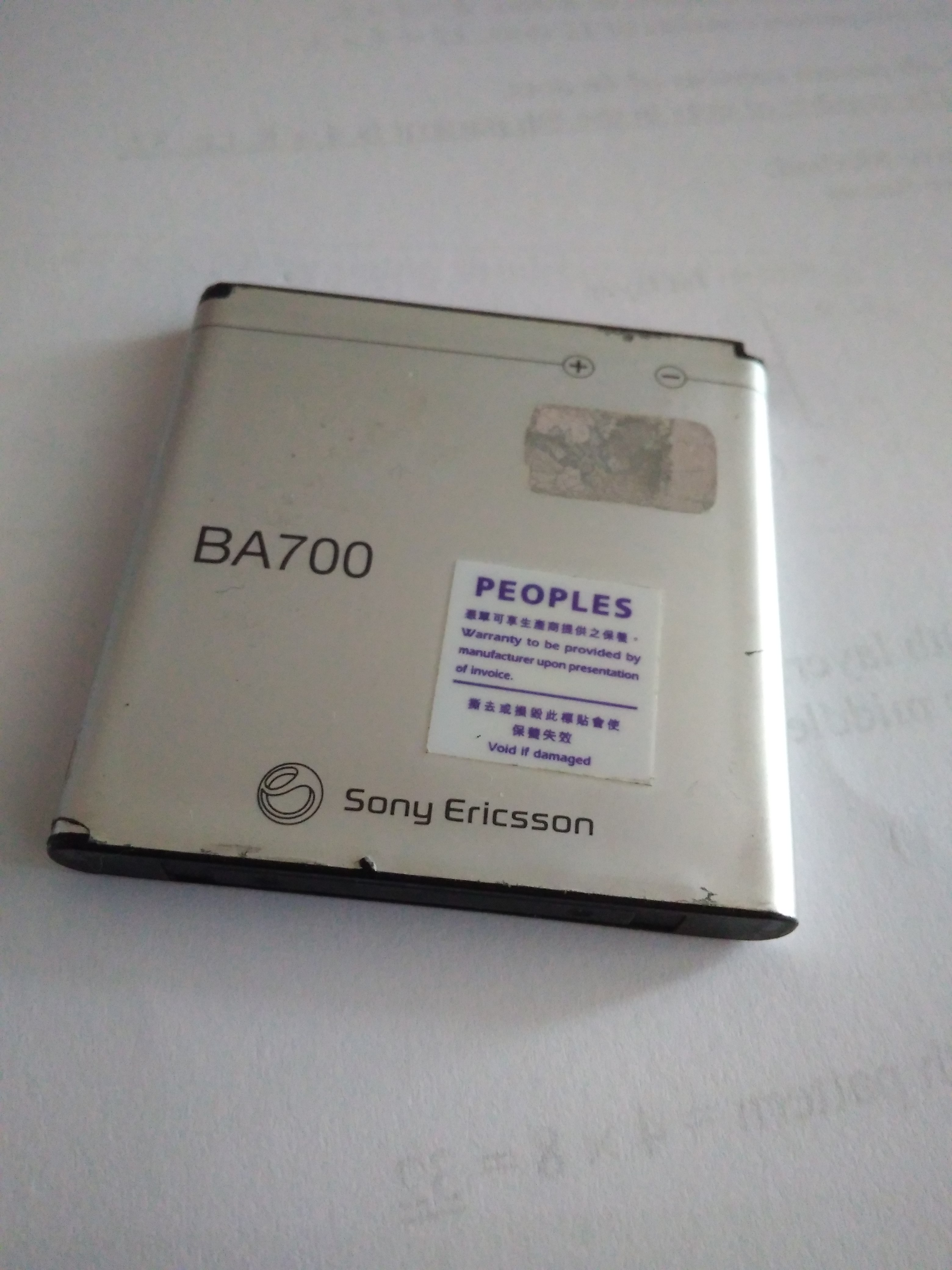 正